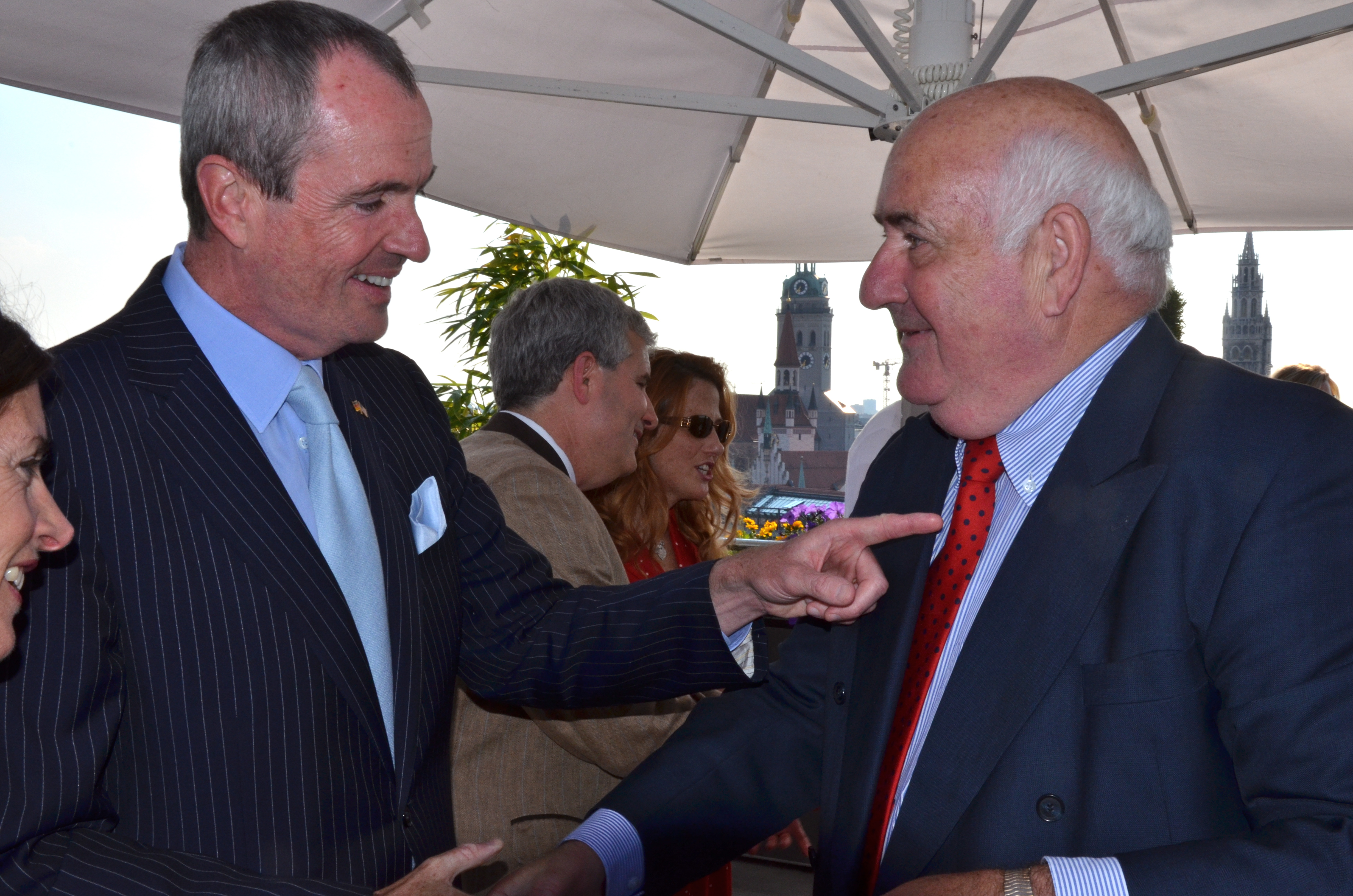 Botschafter Murphy und Professor Werner Weidenfeld